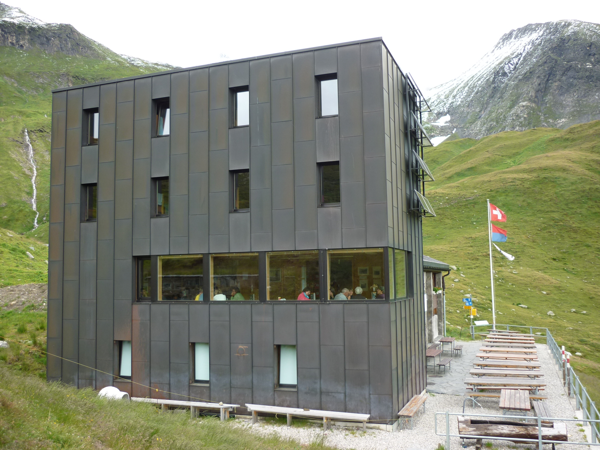 Motterasciohütte, Greinagebiet, Kanton Tessin, Schweiz